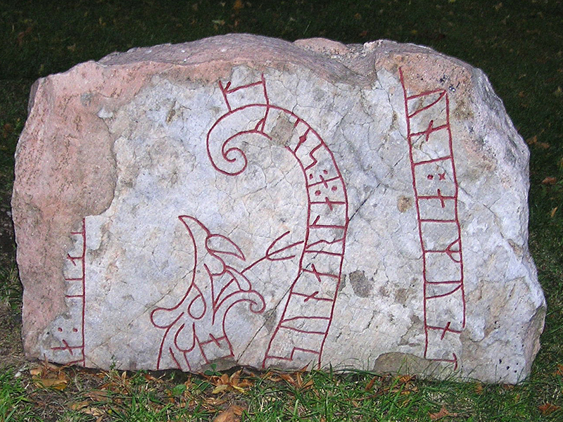 Sö279 strängnäs